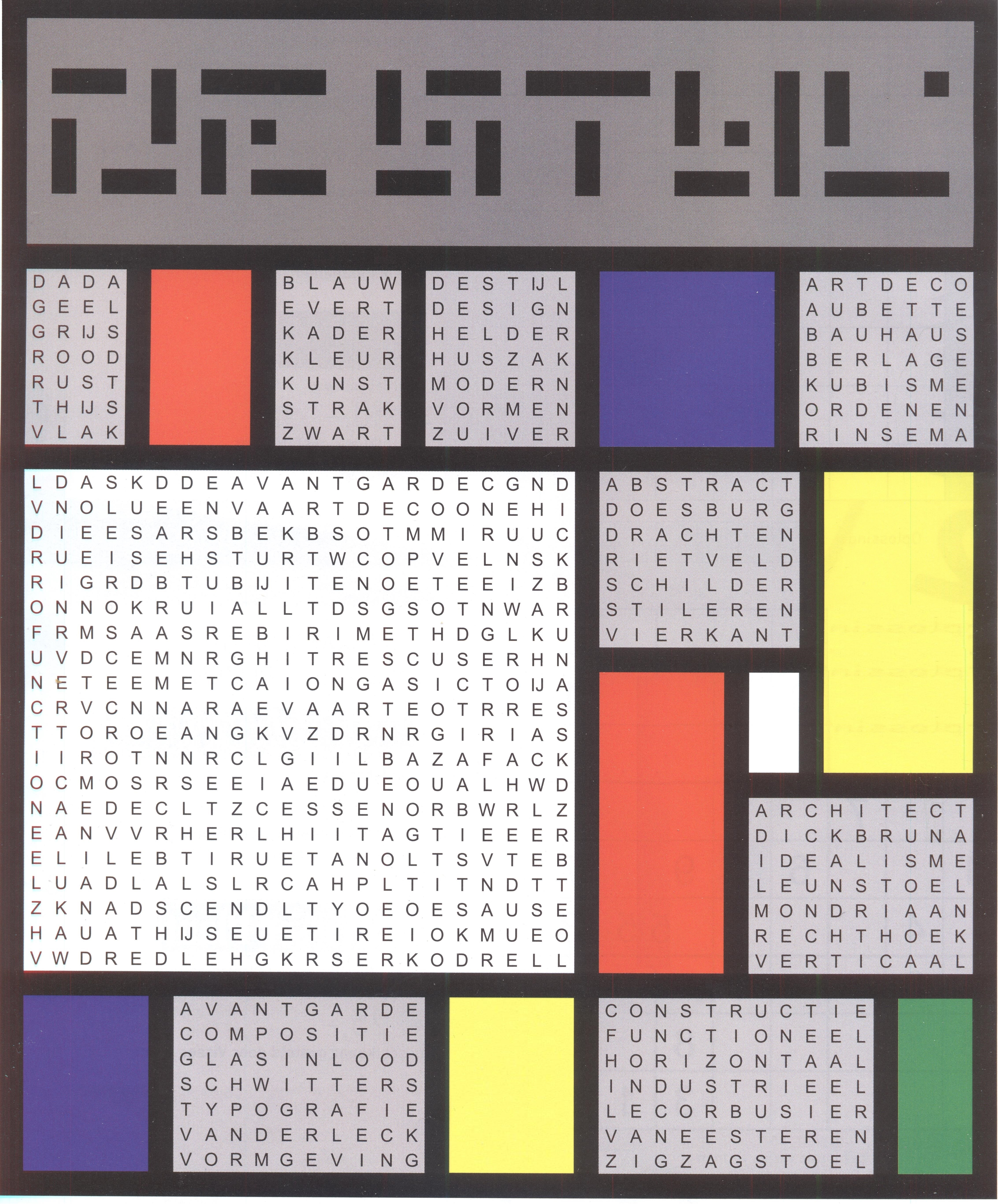 VDM speurpuzzel met thema De Stijl